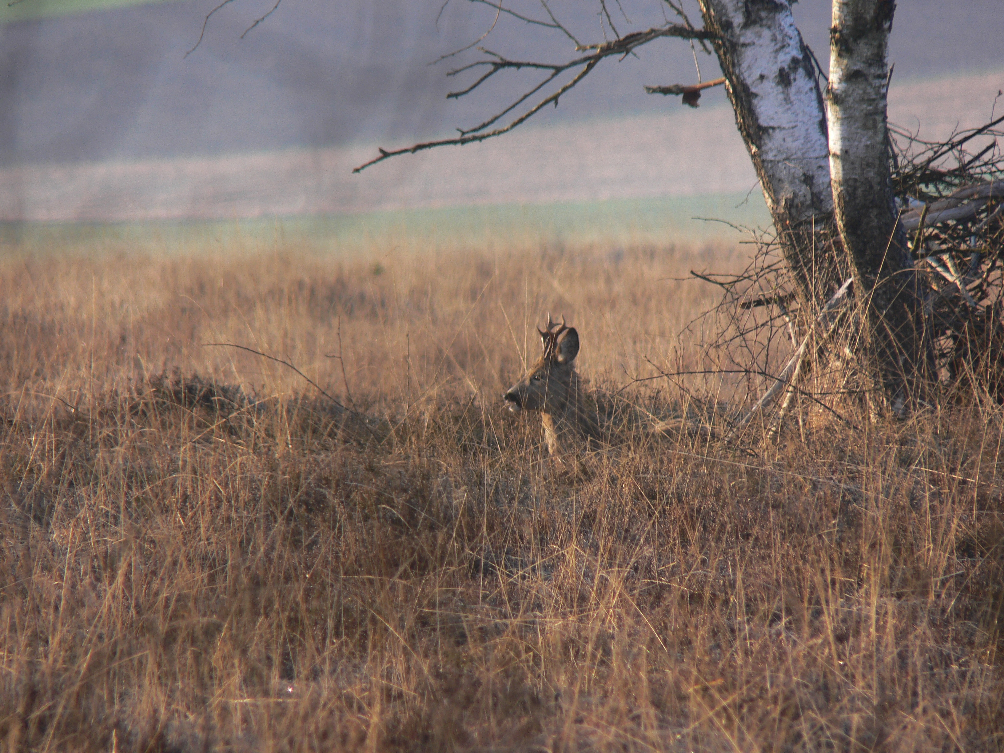 Seeleithensee und angrenzende Streuwiesen This media shows the nature reserve in Upper Austria with the ID n105.